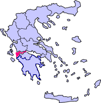 מפרץ פטרס (הועלה מויקי האנגלית שונה על ידי) מקור: image:Peripheries of Greece.png